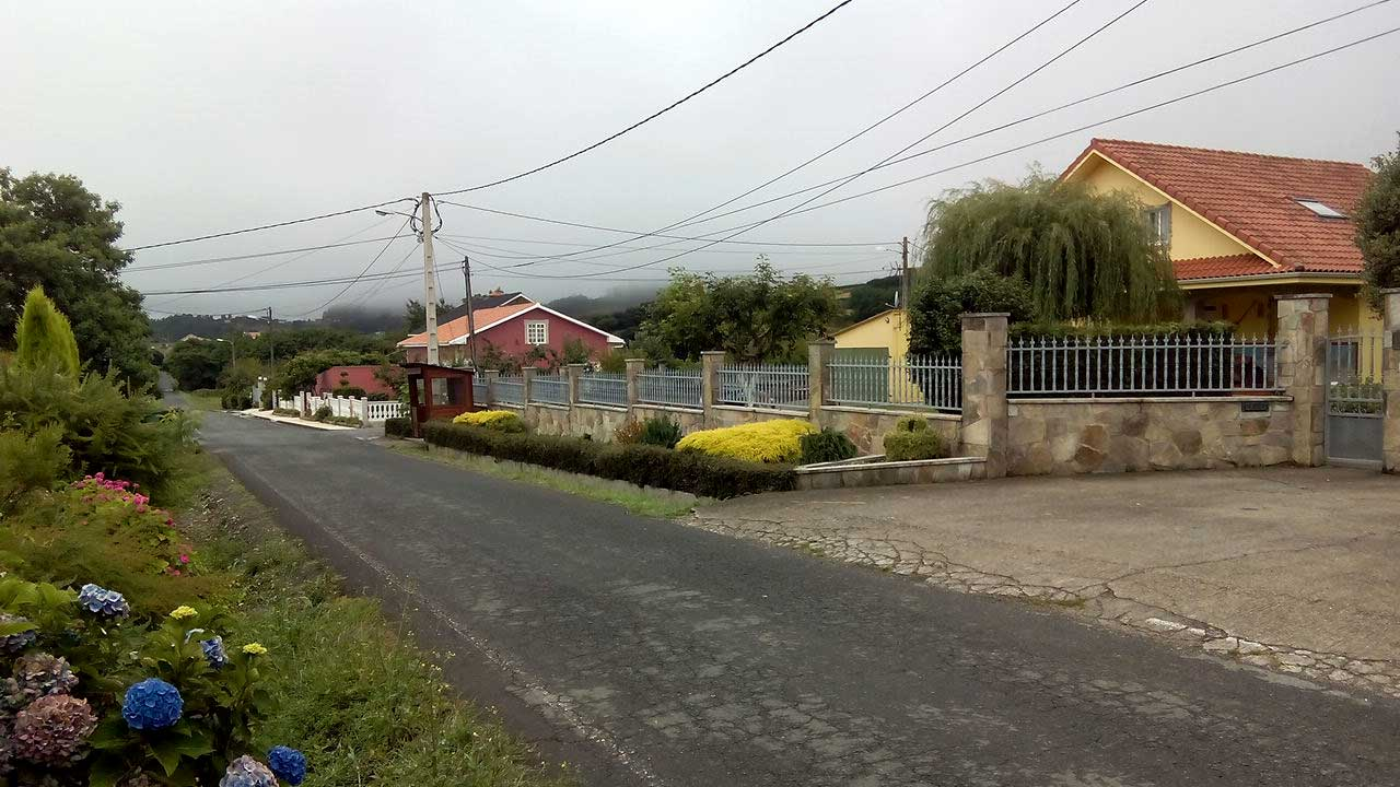 Vista do Grandal, O Val.